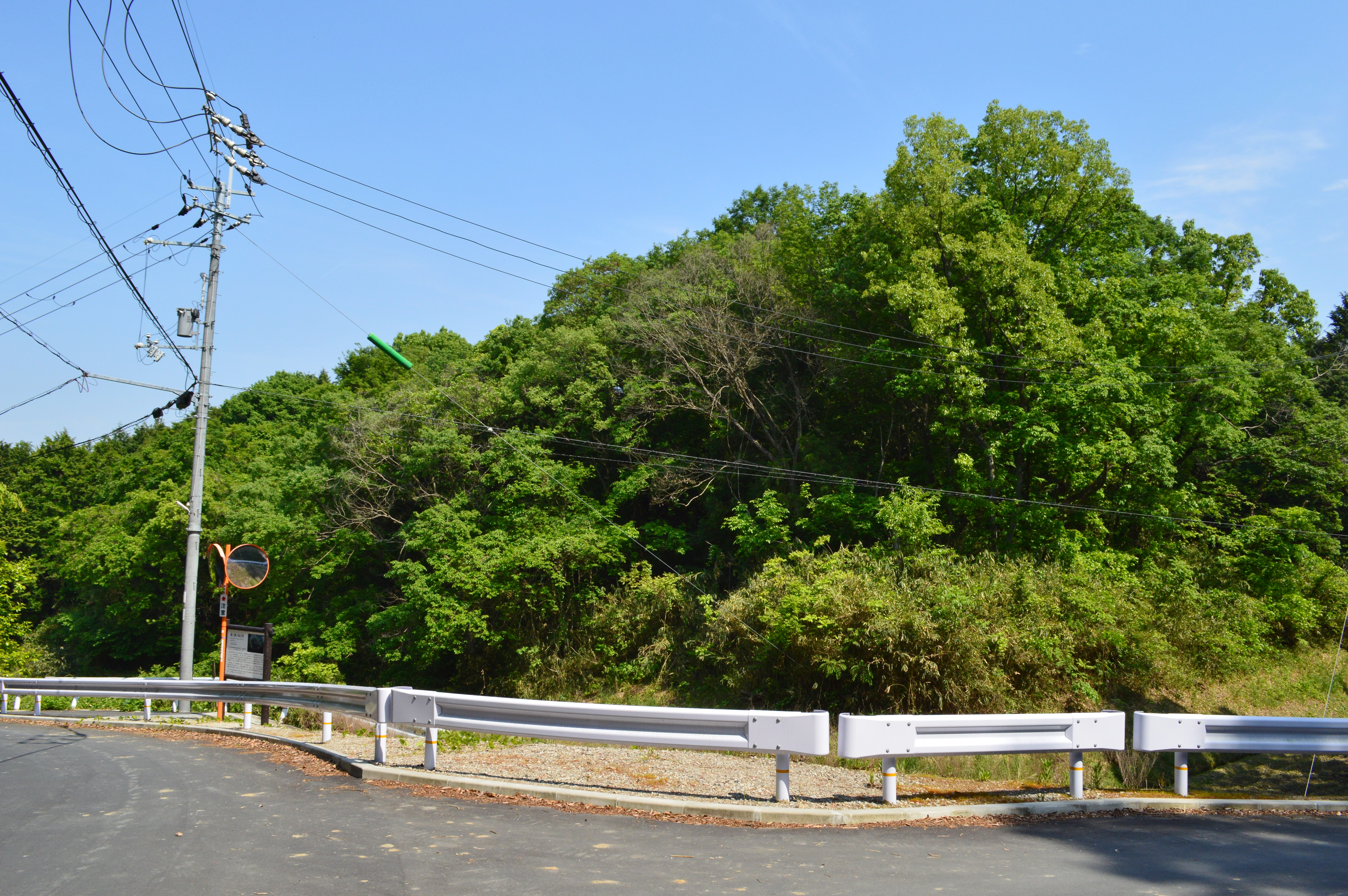 掖上鑵子塚古墳 墳丘全景